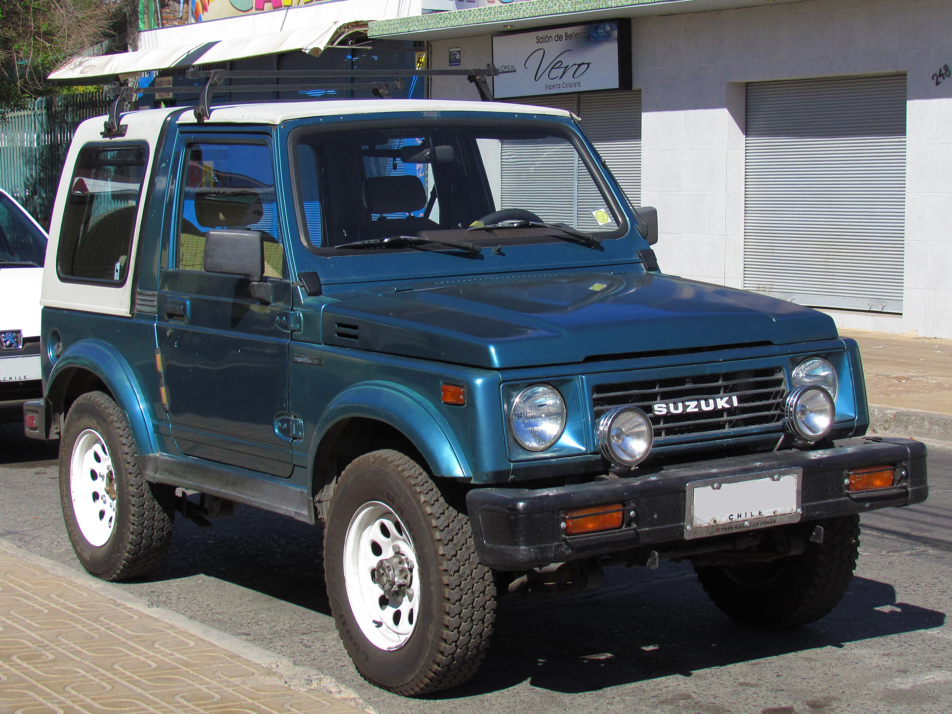 Suzuki Samurai SJ 413 QX 1989